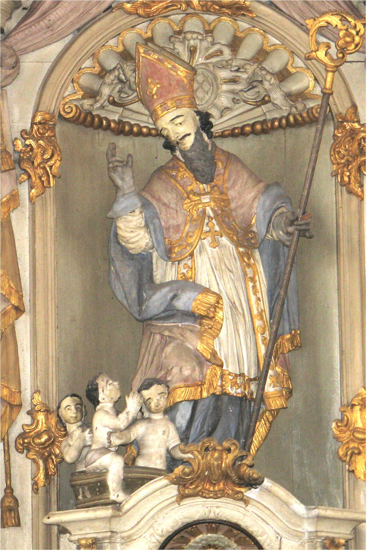 De Niklos an der Nikloskierch zu Veianen. Kategorie:Gemeng Veianen